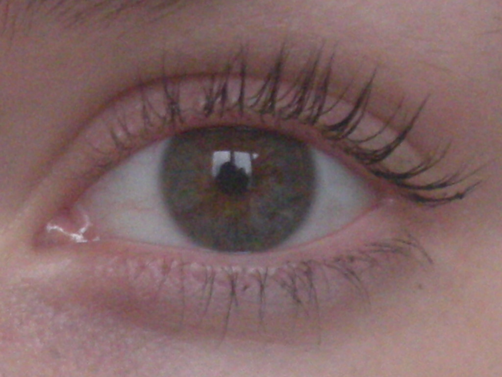 Центральная гетерохромия у человека.